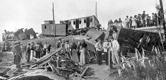 Fotografia de l'accident ferroviari del pont de la riera de Riudecanyes (25-11-1907)